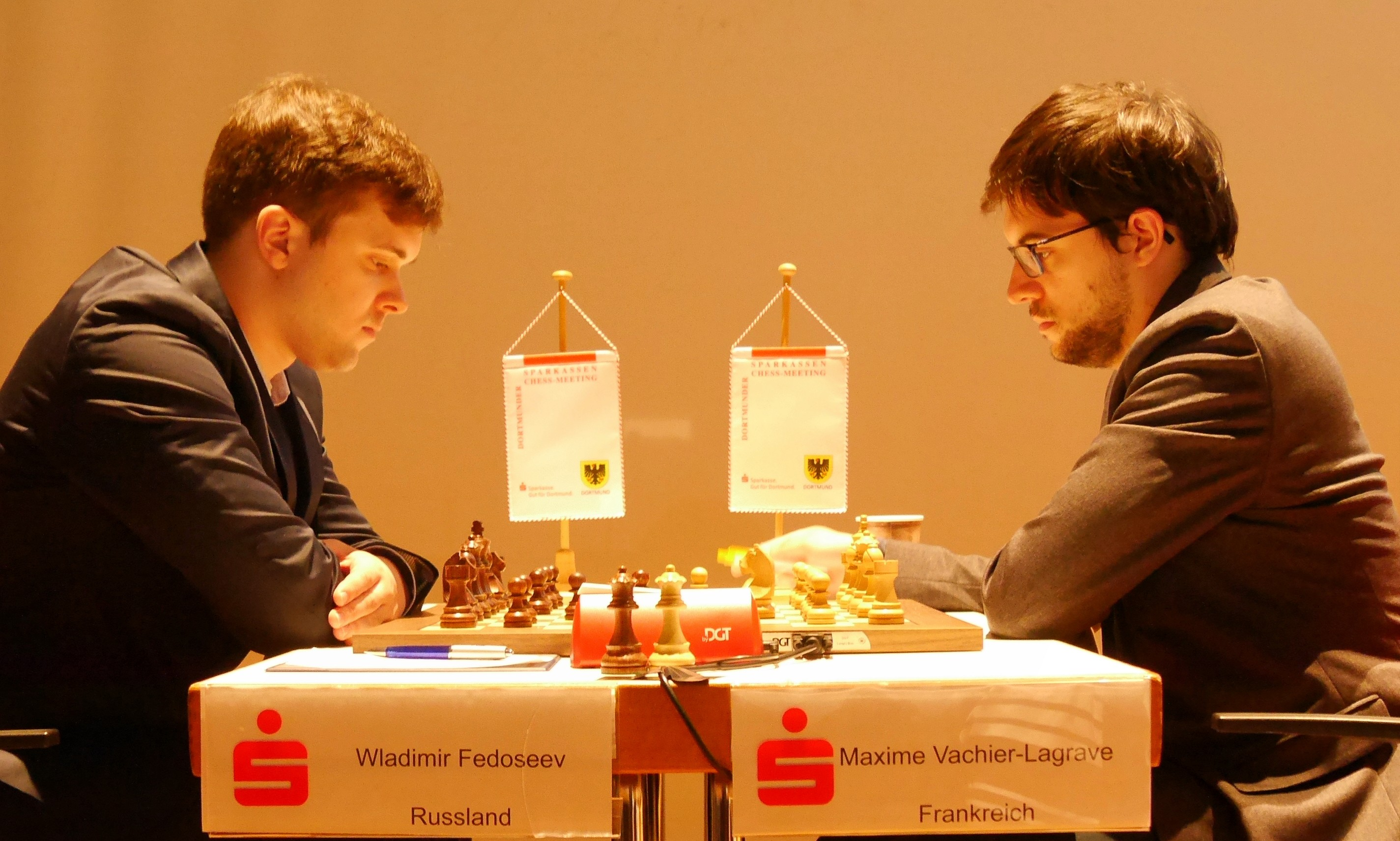 Wladimir Fedoseev und Maxime Vachier-Lagrave, Runde 6 der Dortmunder Schachtage 2017.